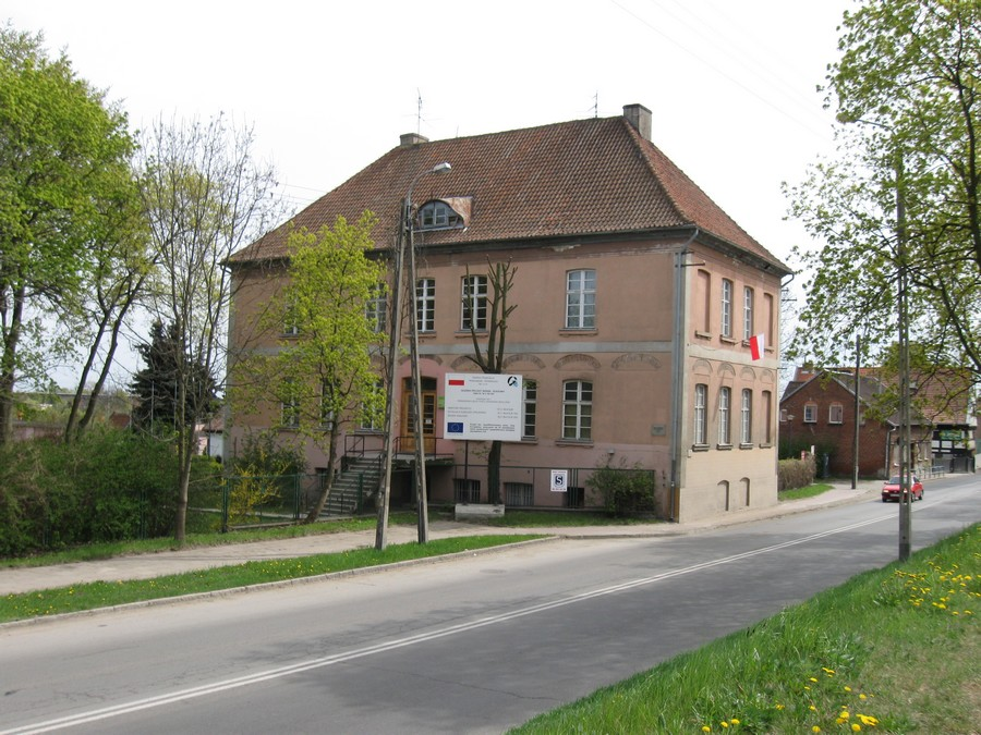 Gdańsk Lipce. Dwór Ferberów, Trakt Świętego Wojciecha.